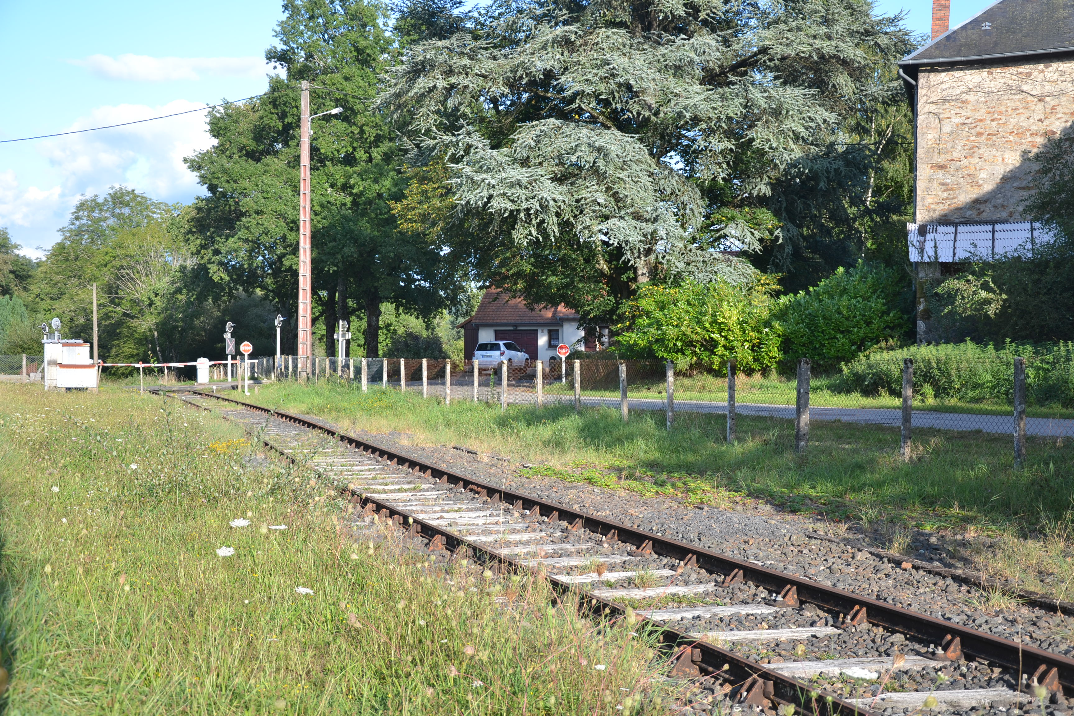 Ancienne voie ferrée de Vieilleville à Bourganeuf, aujourd'hui utilisée par le vélorail de Bosmoreau-les-Mines (Creuse, France).